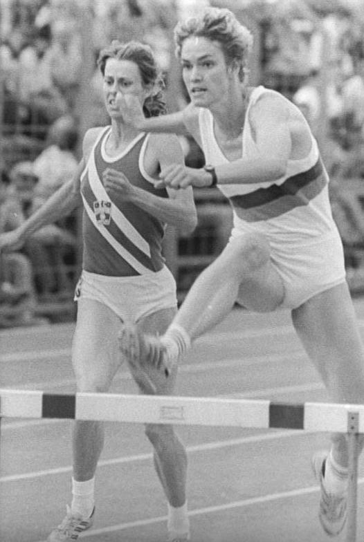 Cornelia Ulrich, Susanne Losch ADN-ZB Kluge 4.6.88 Jena: Leichtathletik-Olympiaqualifikation Die 400 m Hürden gewann am 3.6. Cornelia Ulrich (SC Magdeburg) mit der Jahresweltbestleiszung von 54,81 sec. vor Susanne Losch (SC Turbine). Abgebildete Personen: Ulrich, Cornelia: Leichtathletin, Hürdenläuferin, SC Magdeburg, DDR